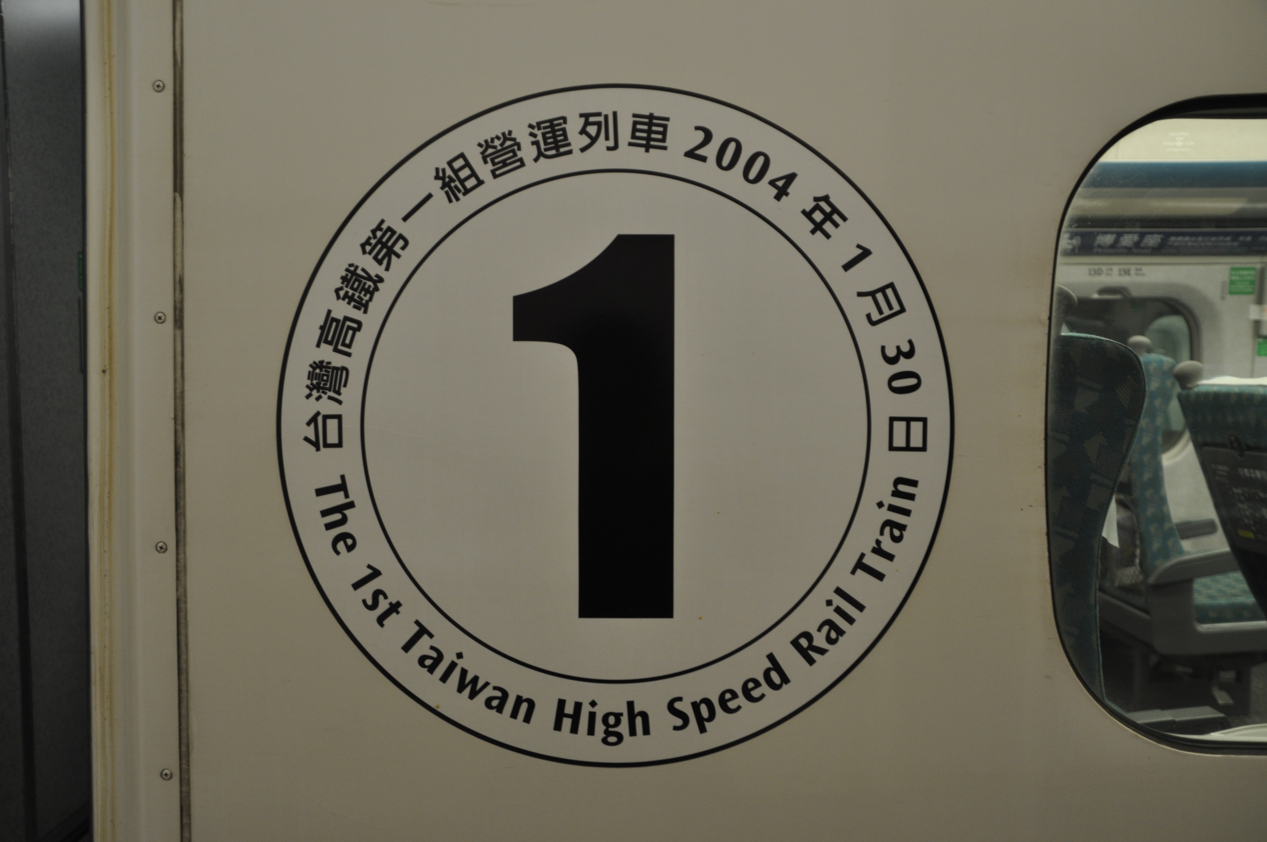 台湾高鐵第一組營運列車